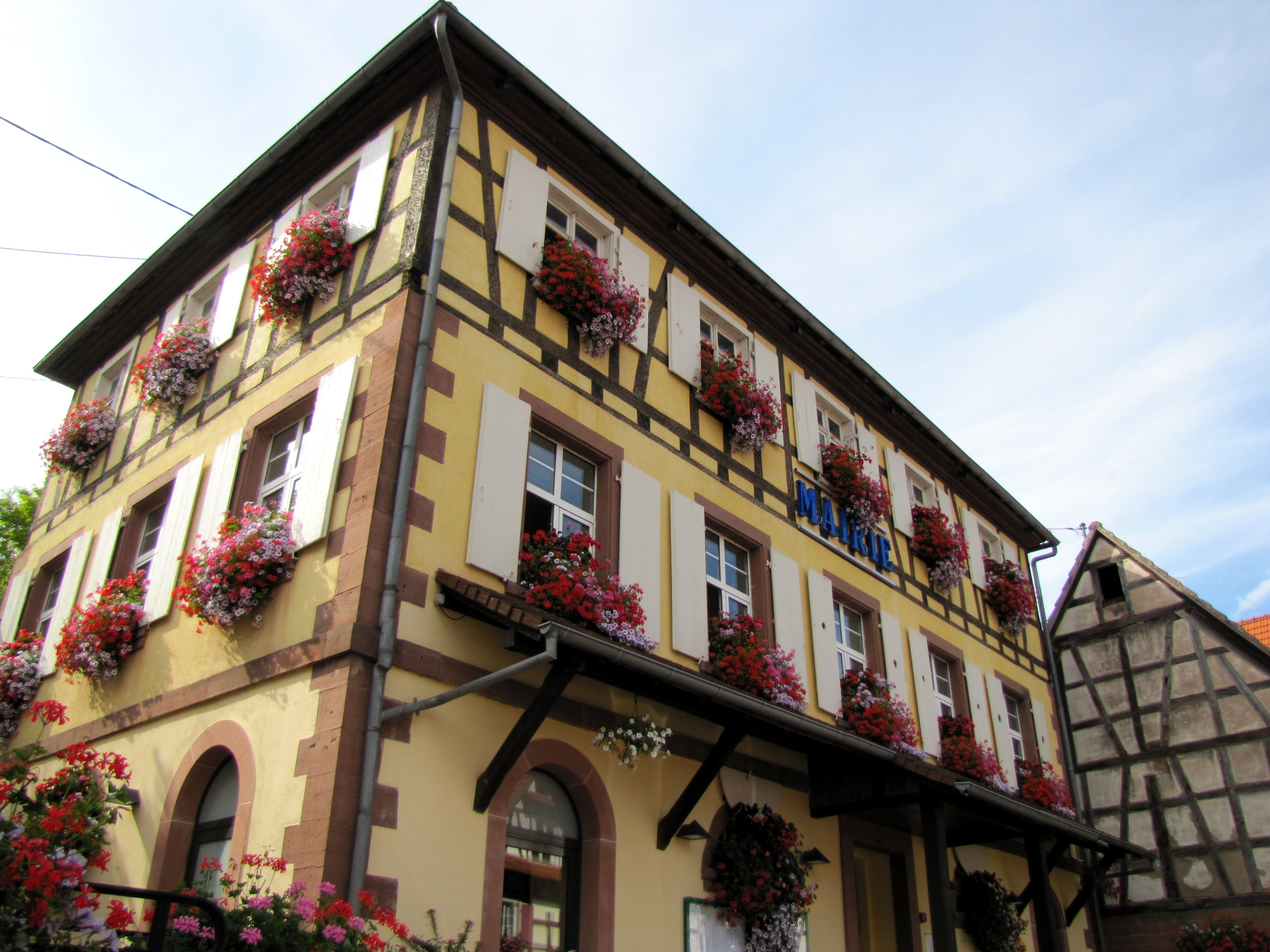 Alsace, Bas-Rhin, Langensoultzbach, Mairie (1825). .